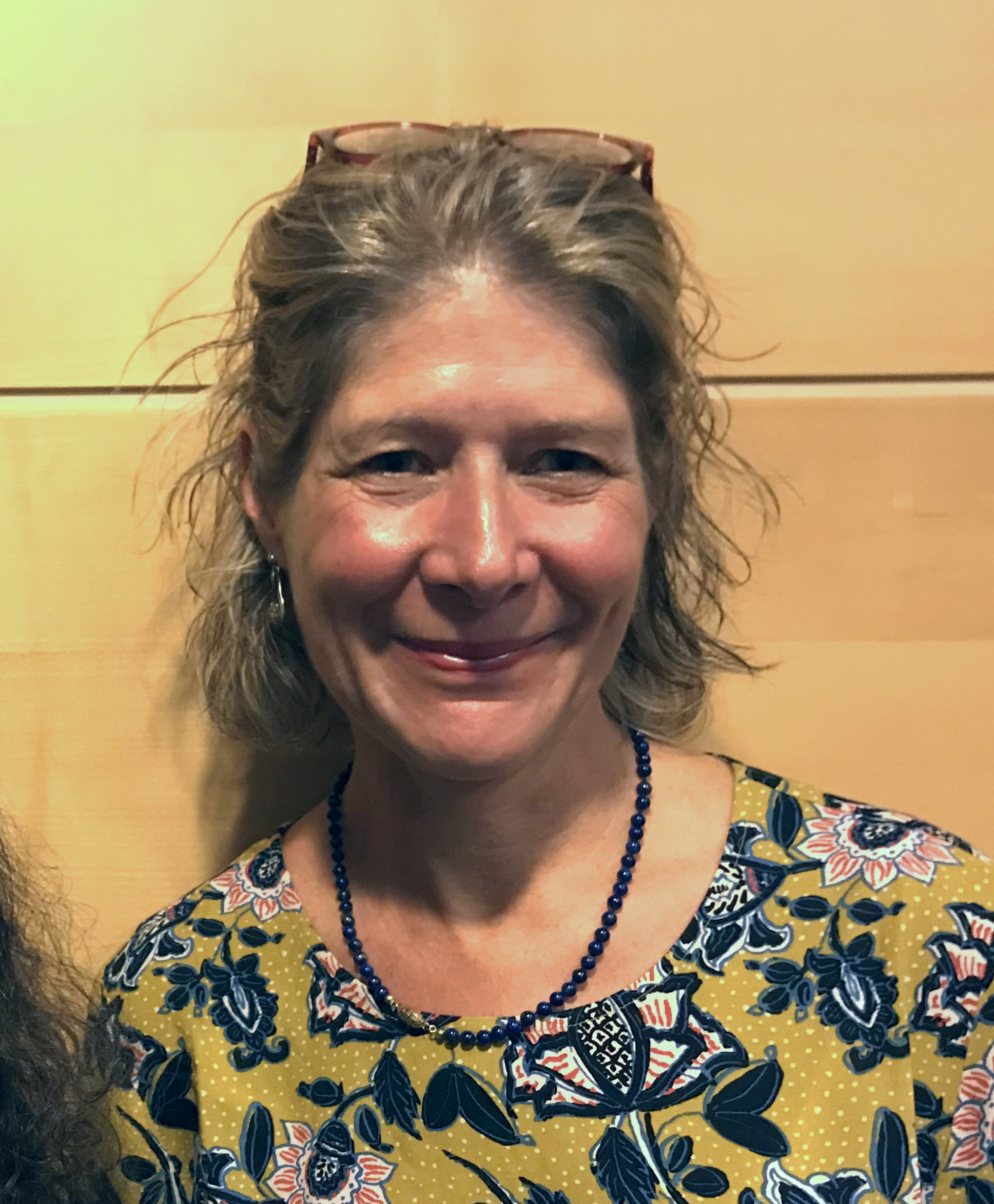 Julie Lindahl, Bokmässan 2019